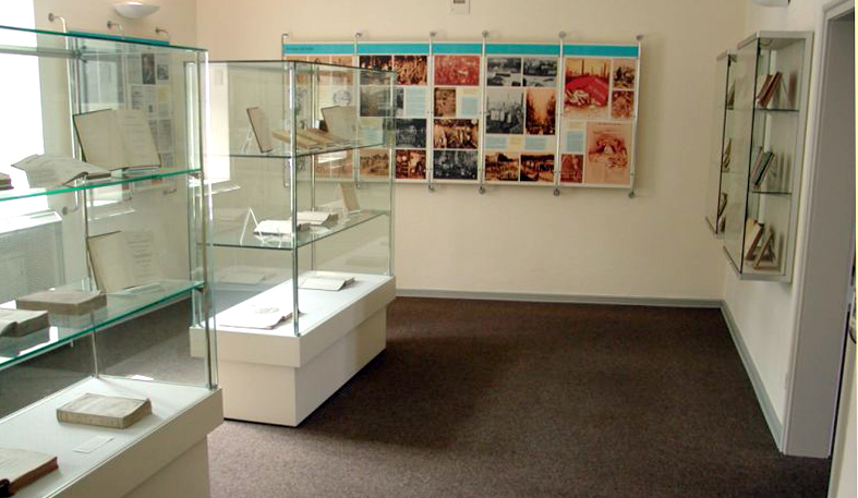 Sujet:Ausstellung am Karl-Marx-Haus 2003 um éischte Stack Source:Eege Foto vum Bnutzer:Stefan Kühn